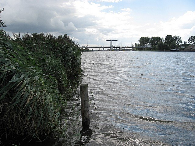 Drontermeer bij Elburg.